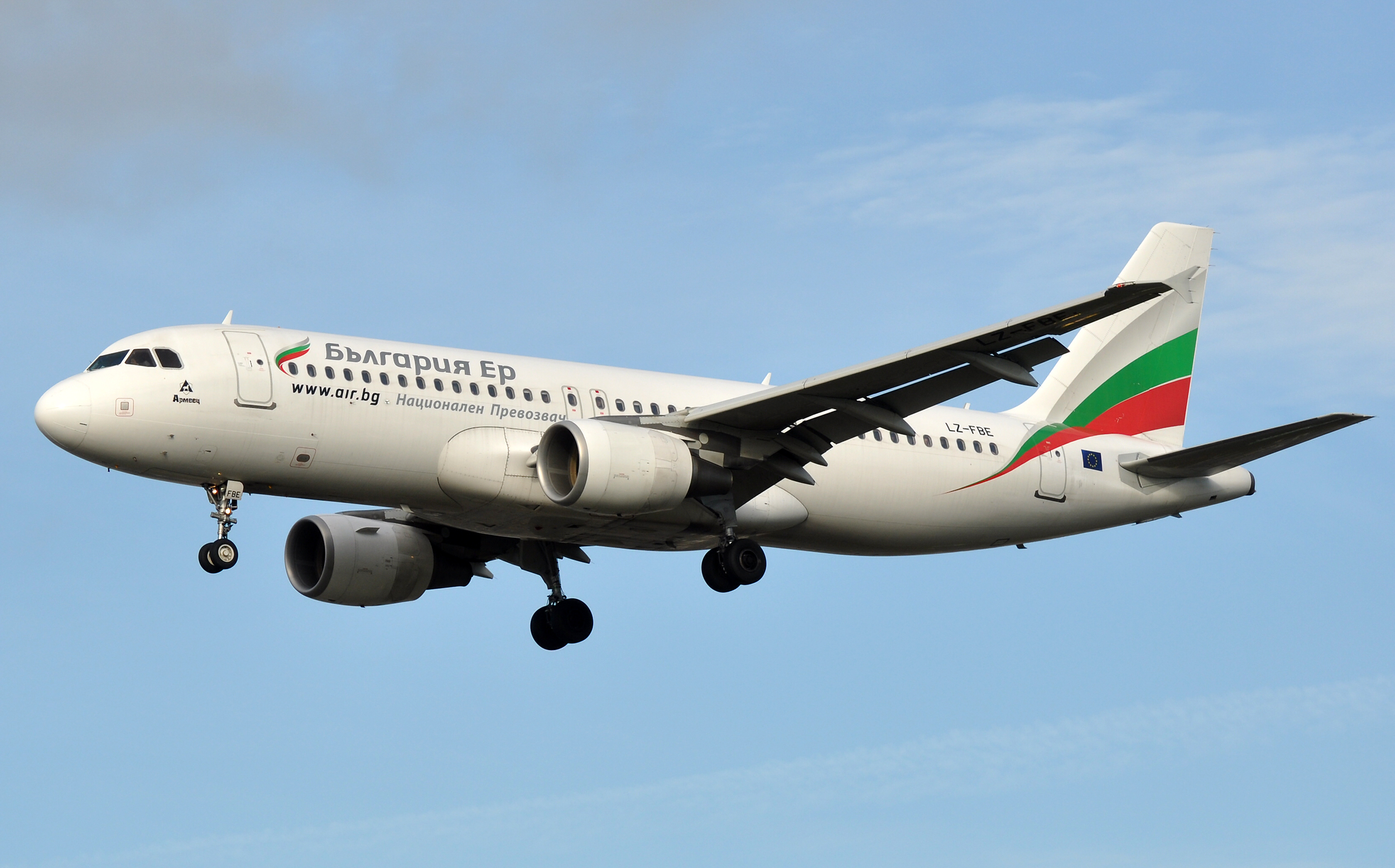 MSN 3780 A320-214 BULGARIA AIR LHR